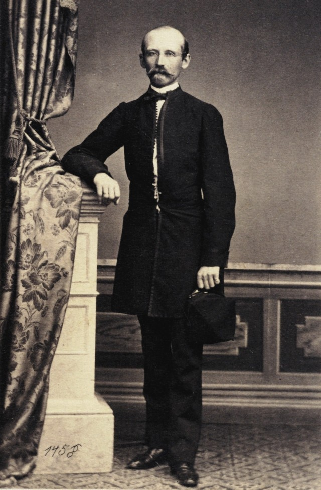 Edmund Taczanowski